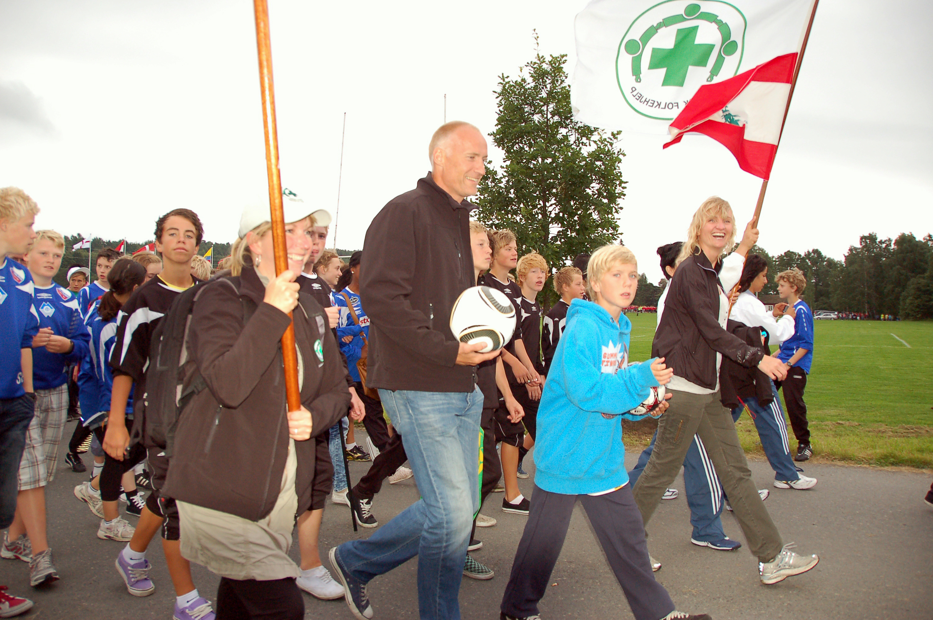 Erik Thorstvedt tjuvstartet feiringen av klasebombeforbudet under Norway Cup-paraden lørdag. Søndag leder han et trommeshow på kulturscenen klokka 1600 på Ekebergsletta for å markere at klasebombeforbudet trer i kraft. Foto: Lena Fiske/Norsk Folkehjelp